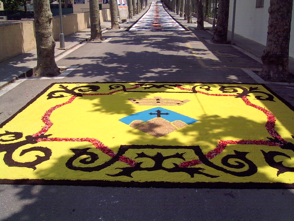 Catifa de flors de l'de Cabrils a Corpus.